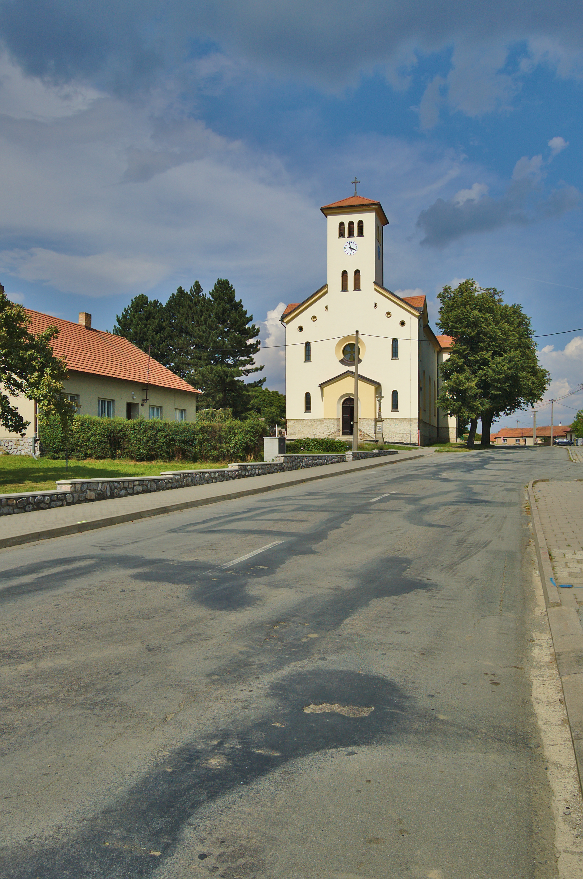 Kostel svatých Cyrila a Metoděje, Molenburk, Vysočany, okres Blansko